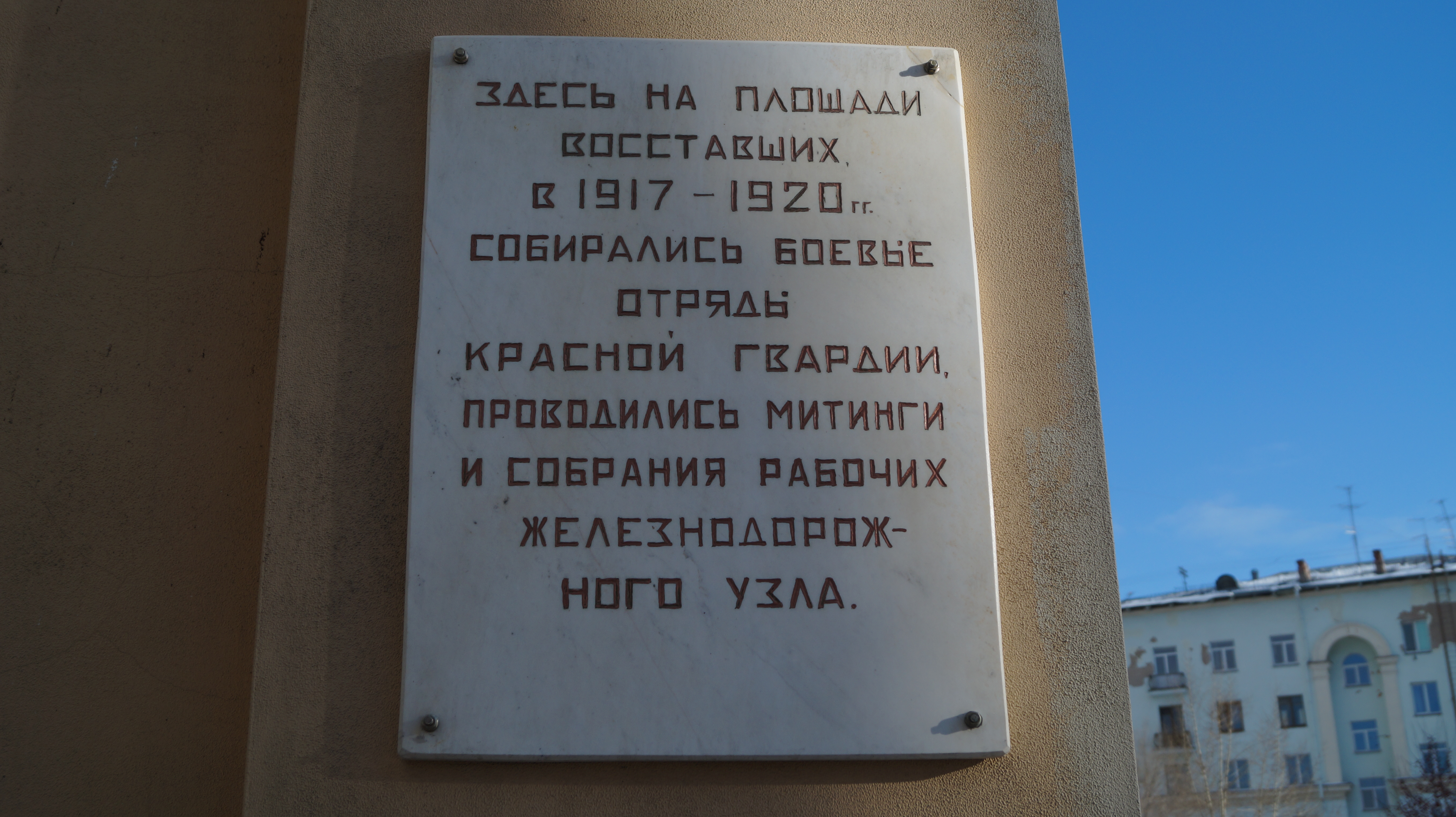 Мемориальная доска на площади Восставших в Челябинске